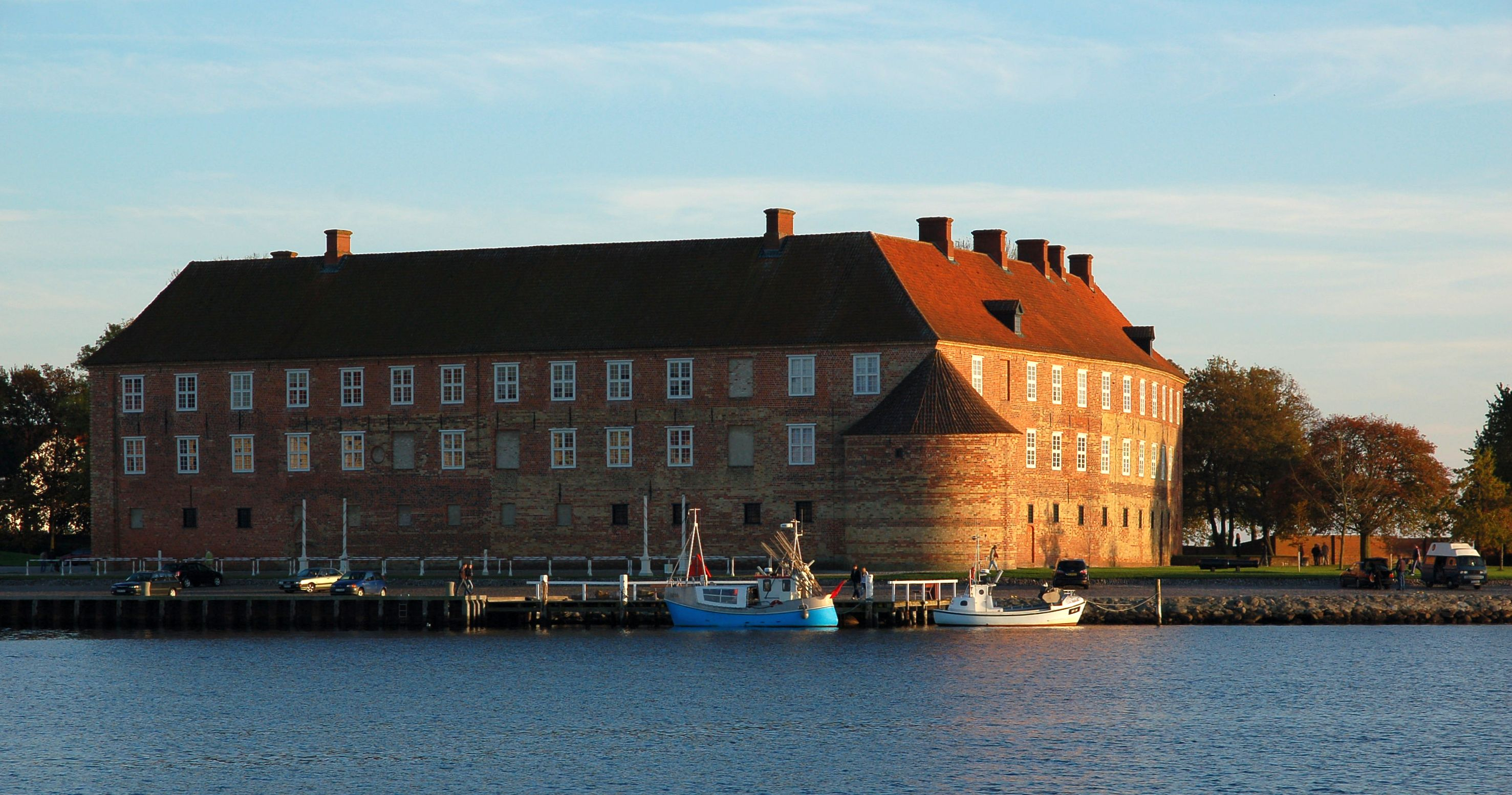 Sønderborg Slot, Denmark